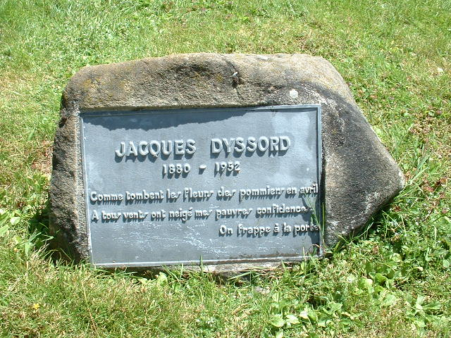 Jacques Dyssord, plaque / stèle posée sur la pelouse au square des poètes